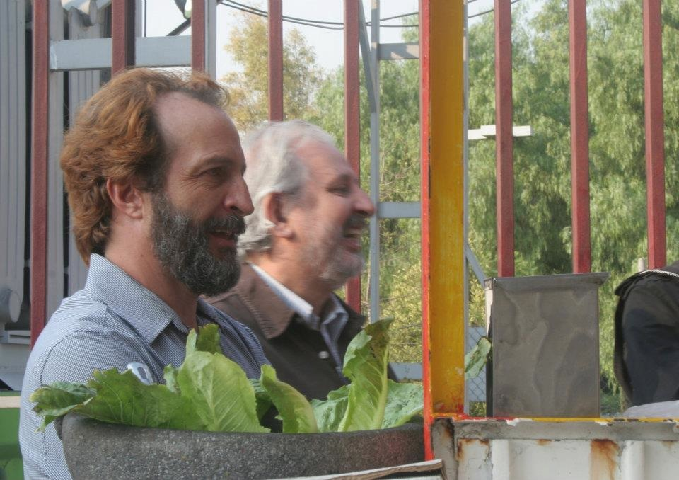 Fotografía en locación de Daniel Giménez Cacho y Marco Rascón durante la grabación del tercer capítulo de la temporada. se encuentran frente al puesto "Tacos las Torres" al norte de la Ciudad de México